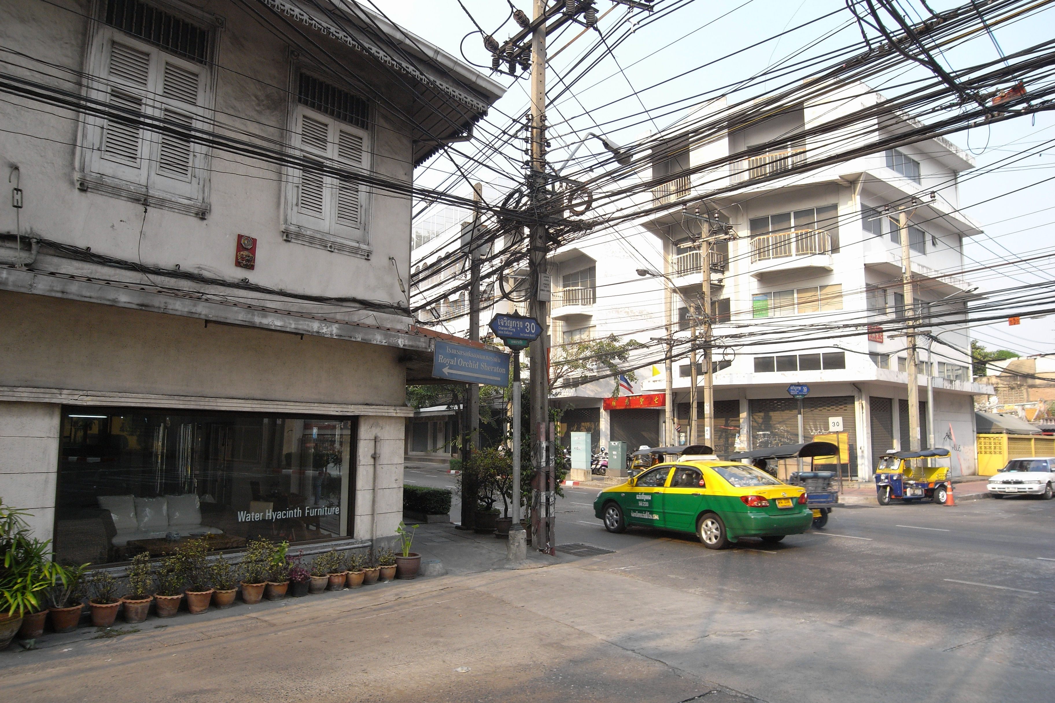 The beginning of Soi Charoen Krung 30, aka Captain Bush Lane, in Bangkok